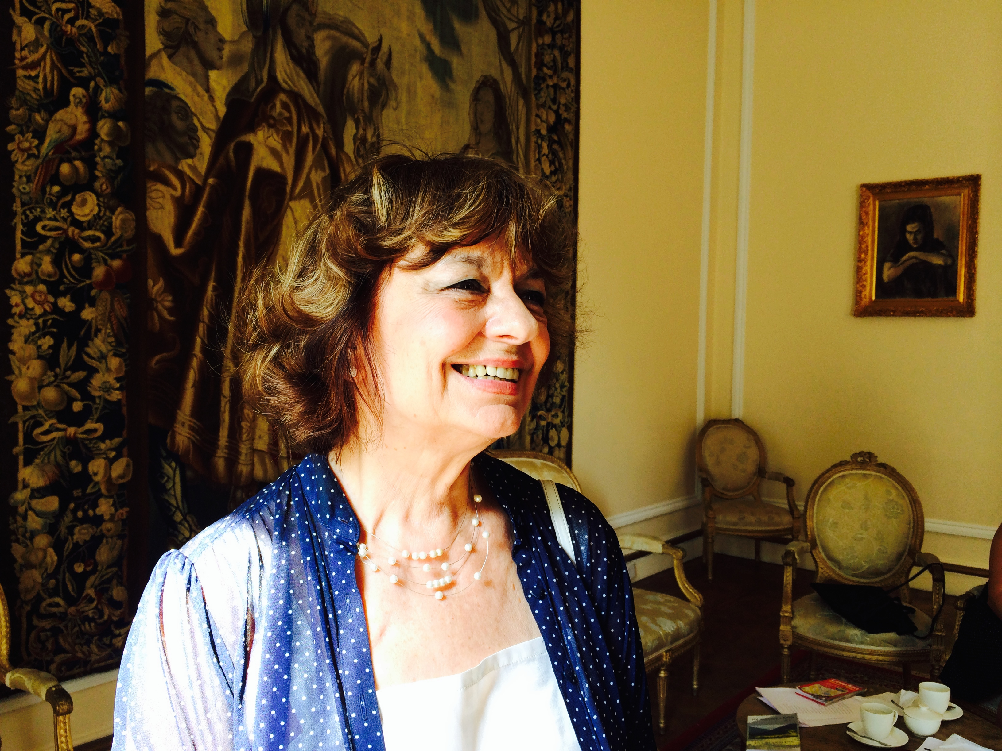 Ana Blandiana 2014